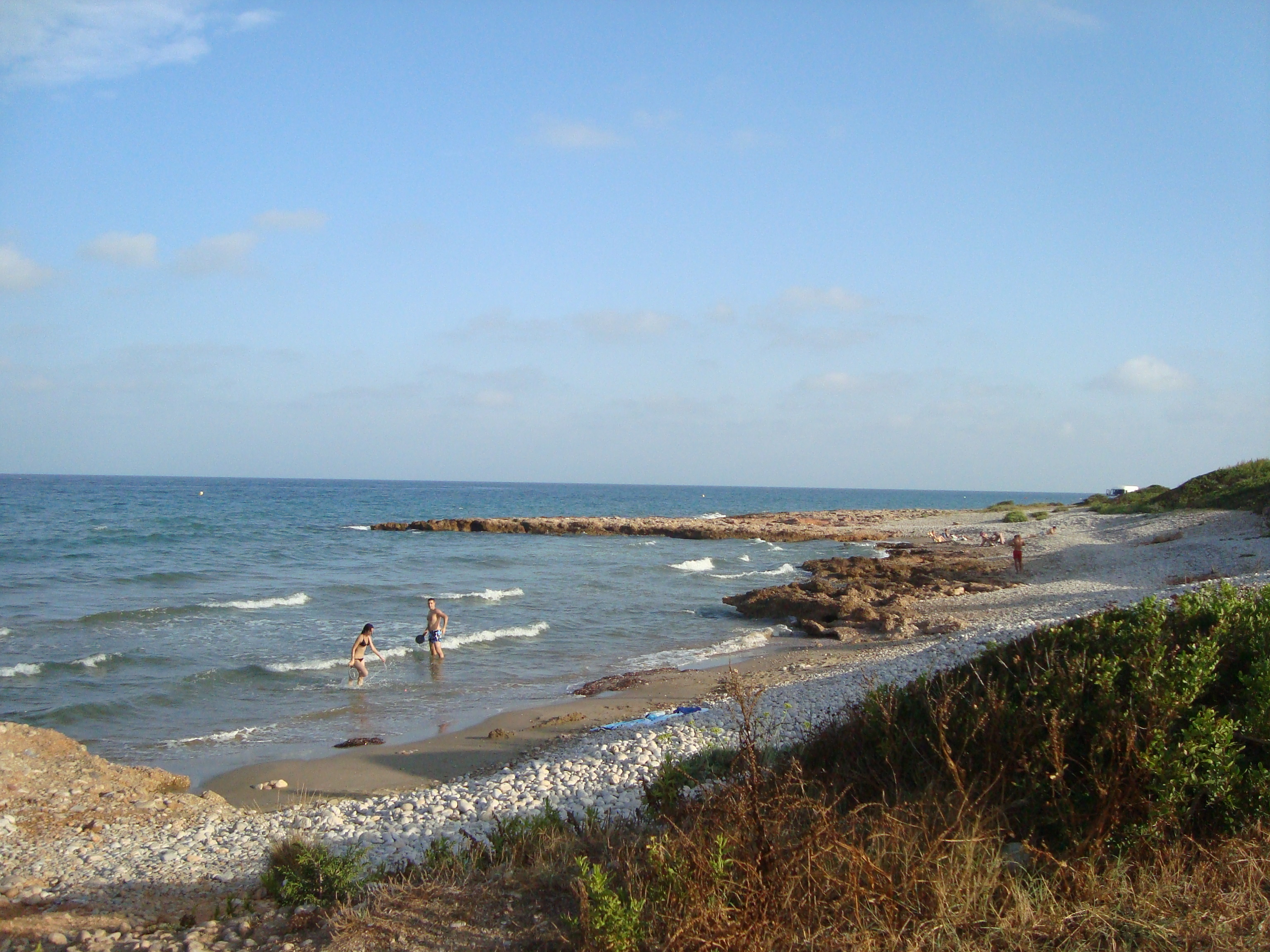 Las Tres Playas, Alcossebre